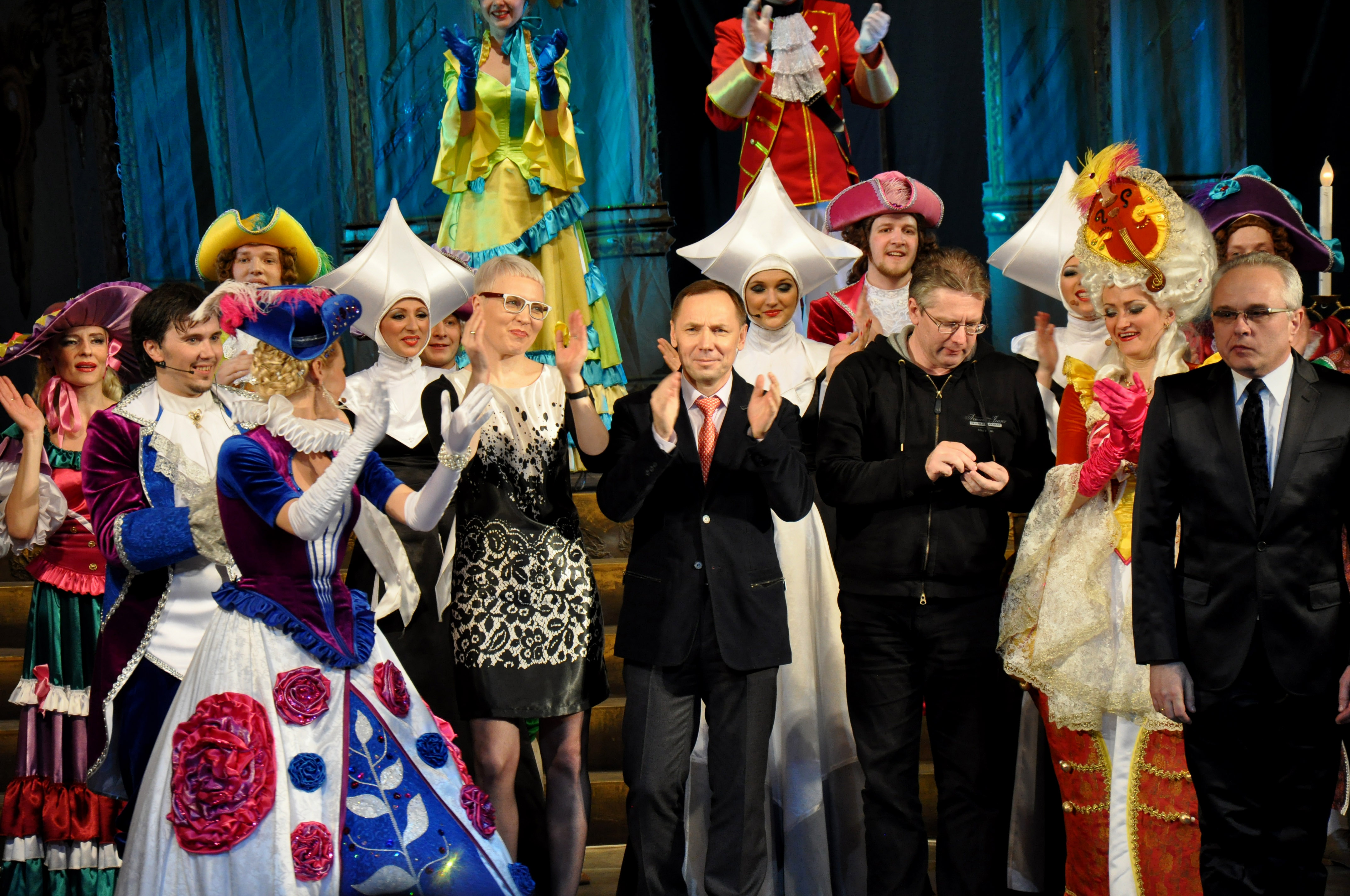 Премьера мюзикла "Казанова" в Красноярском музыкальном театре, 2013 год.